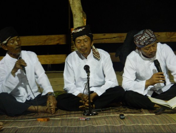 Sunda: nu maca naskah (nu ngilo) Aman Suwitno (katuhu); nu ngabeluk Ruhiyat (tengah) jeung Dodo (kiri) dina pagelaran Beluk di Pasir Impun Atas, Festival Budaya Masyarakat Adat Tatar Sunda 29 Mei 2012